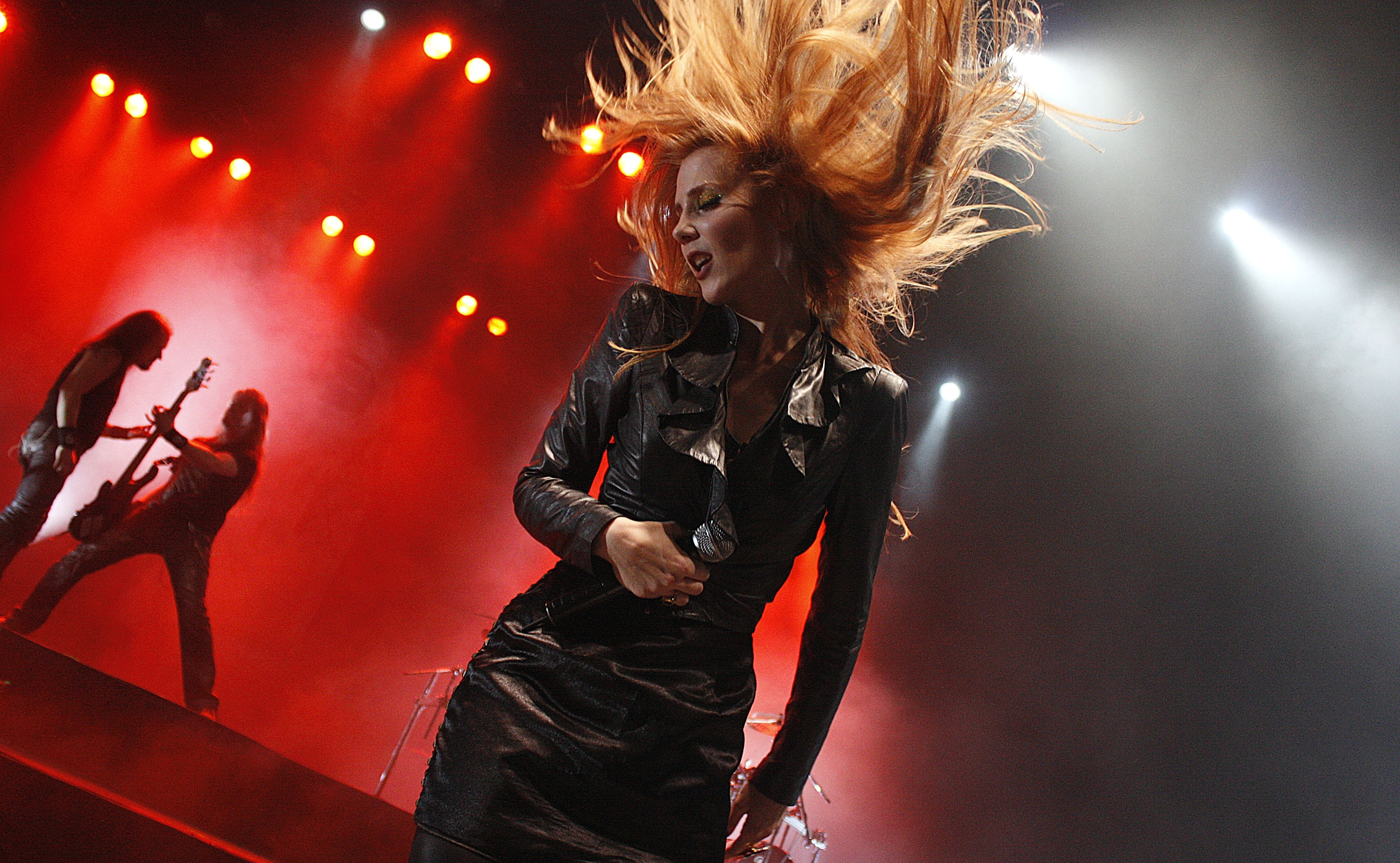 Epica - São Paulo/SP